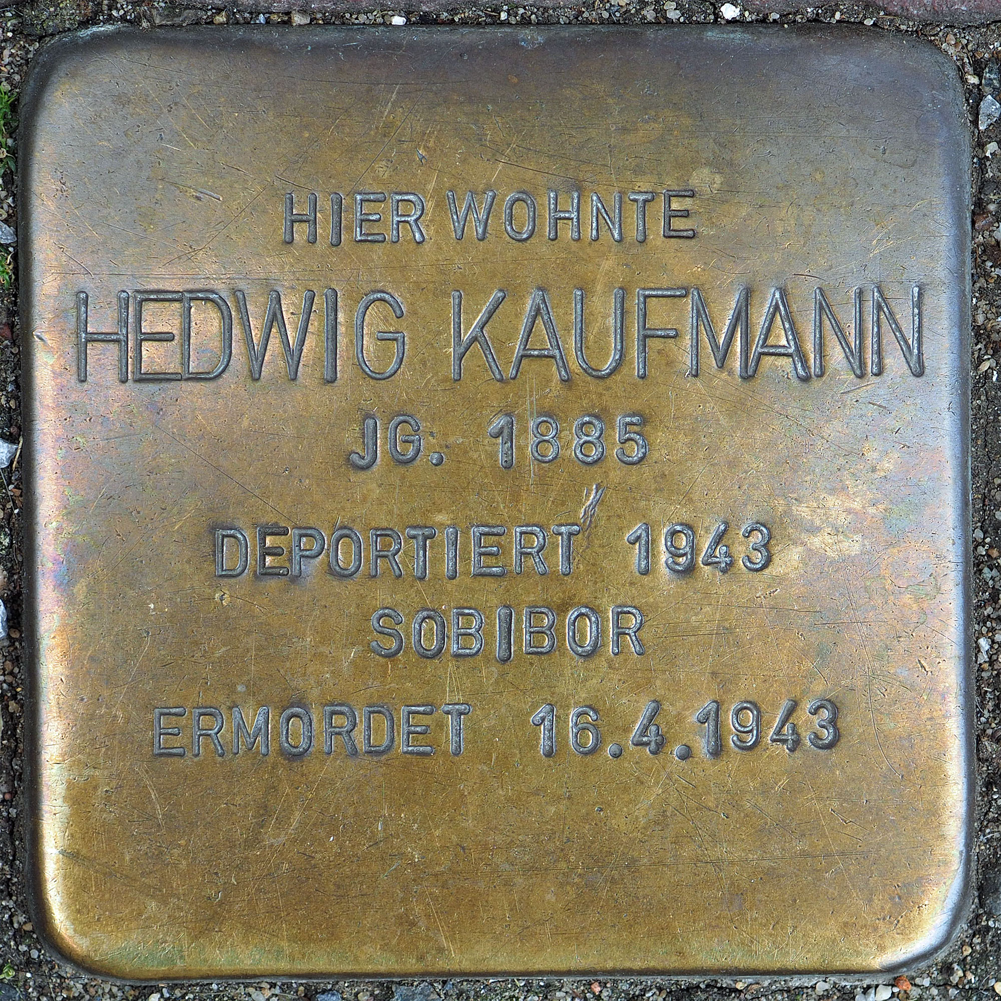 Stolperstein Geldern Hartstraße 02 Hedwig Kaufmann